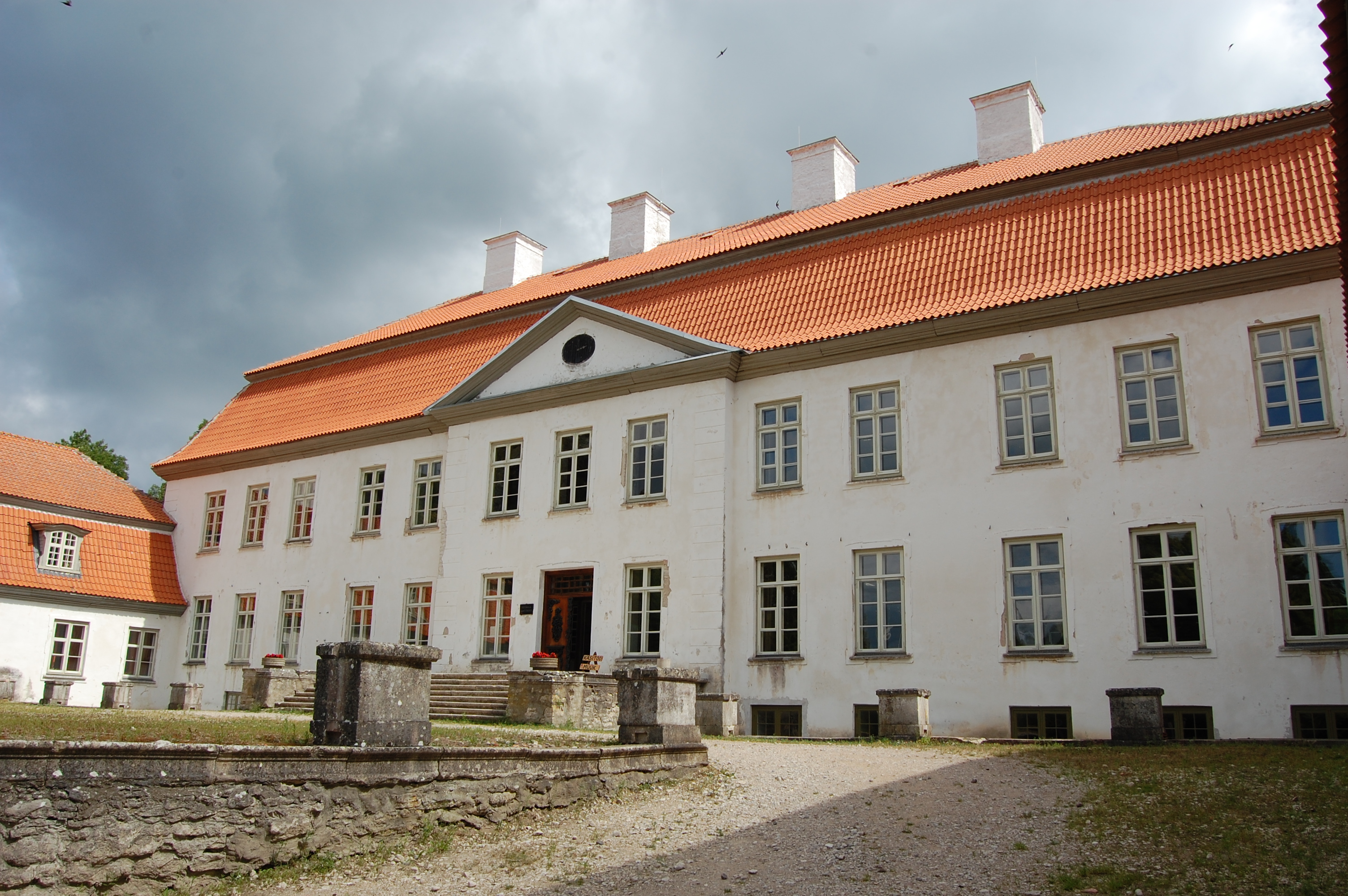 Suuremõisa härrastemaja